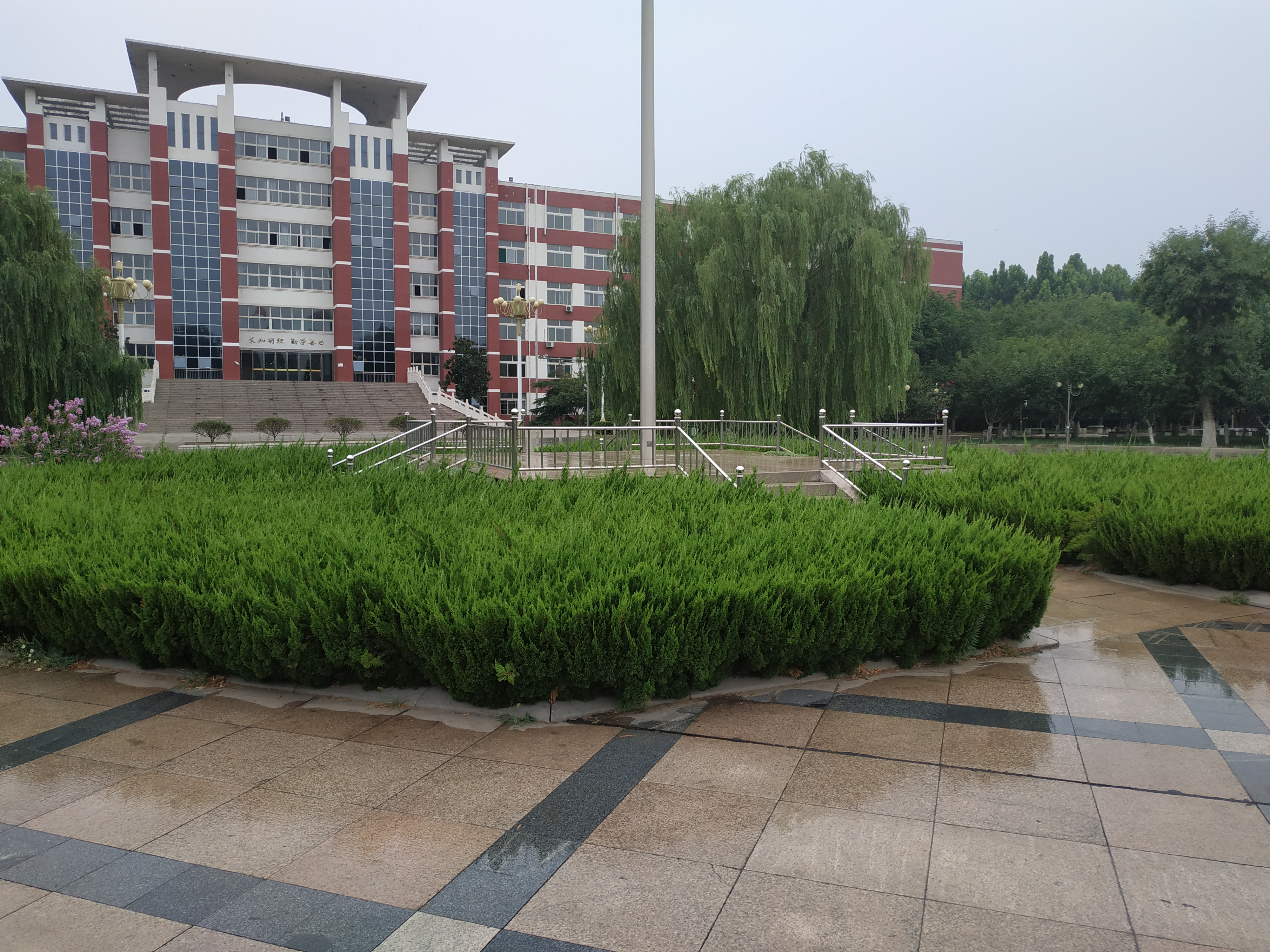 中文（中国大陆）: 山东协和学院系列照2